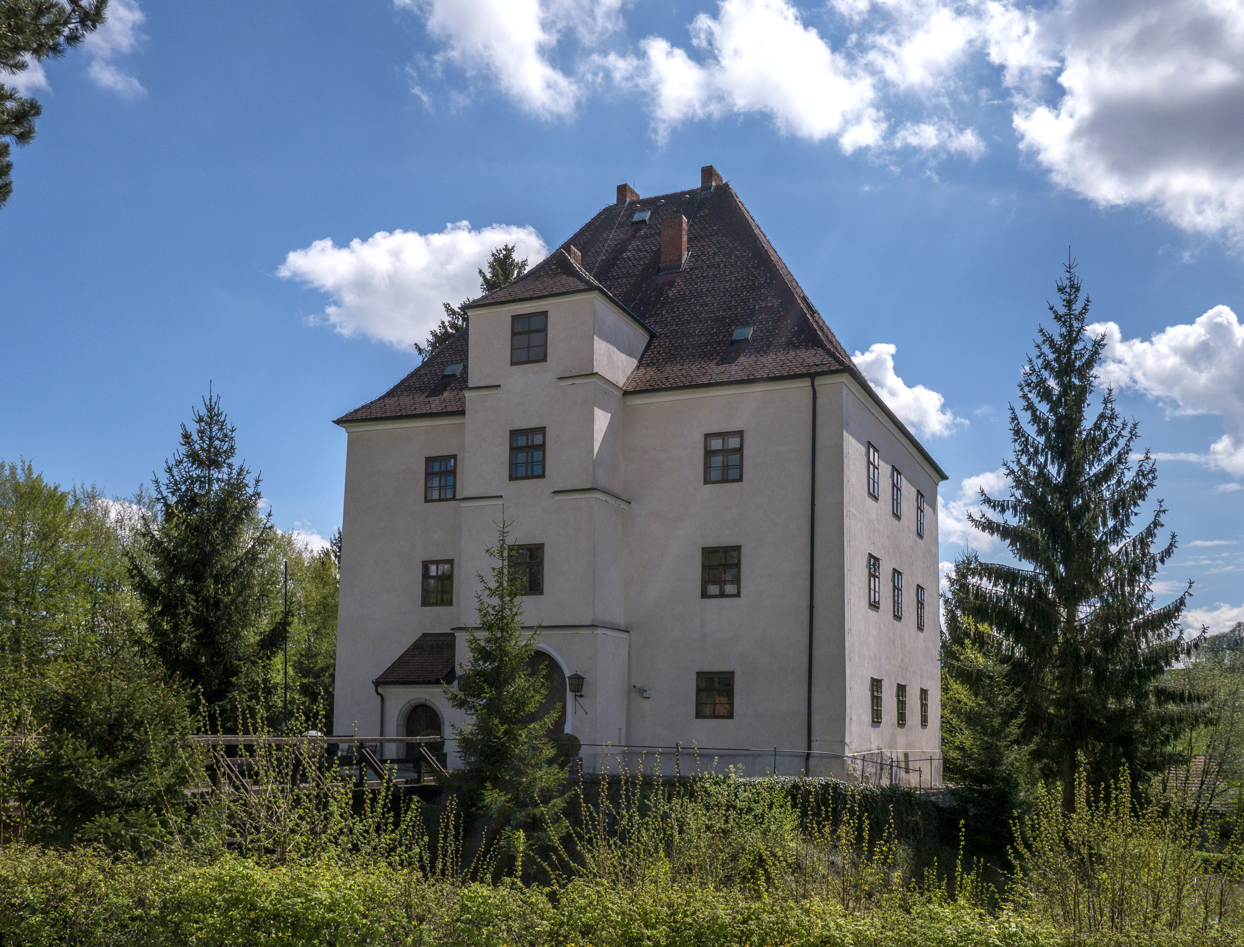 Schloss, ehem. Bezirksgericht; Nordseite; Die hier dargestellte Schräge der Außenwände entspricht einer waagrechten gehaltenen Kamera.